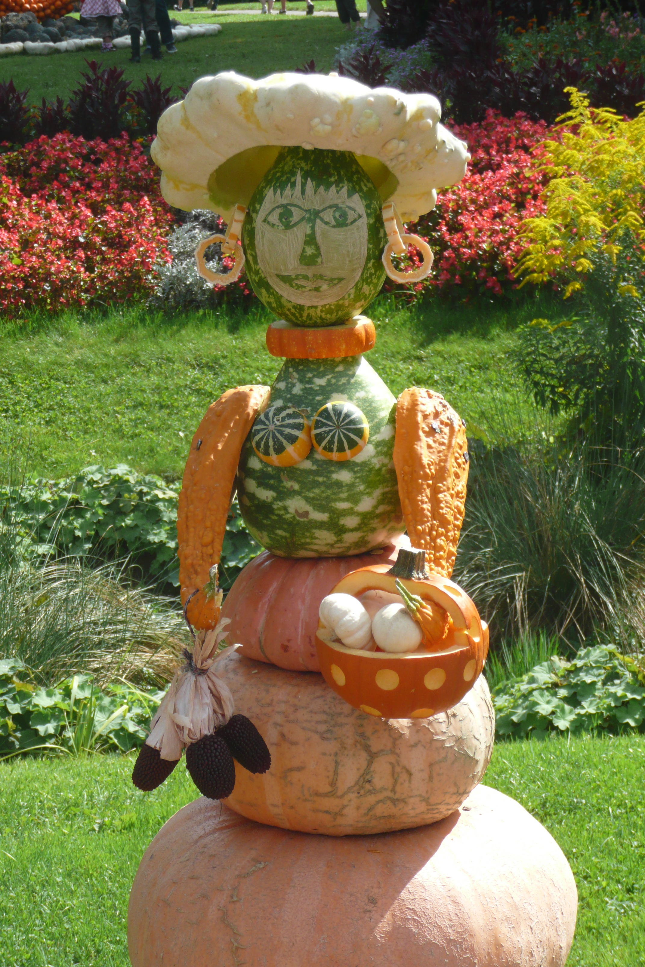 Kürbisausstellung Ludwigsburg 2010; Thema: "Kürbismeer"